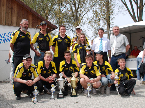 Quelle:DPV-Website Freigabe GFDL: Ticket#: 2006111710003577